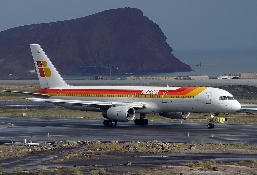 Iberia Boeing 757-200